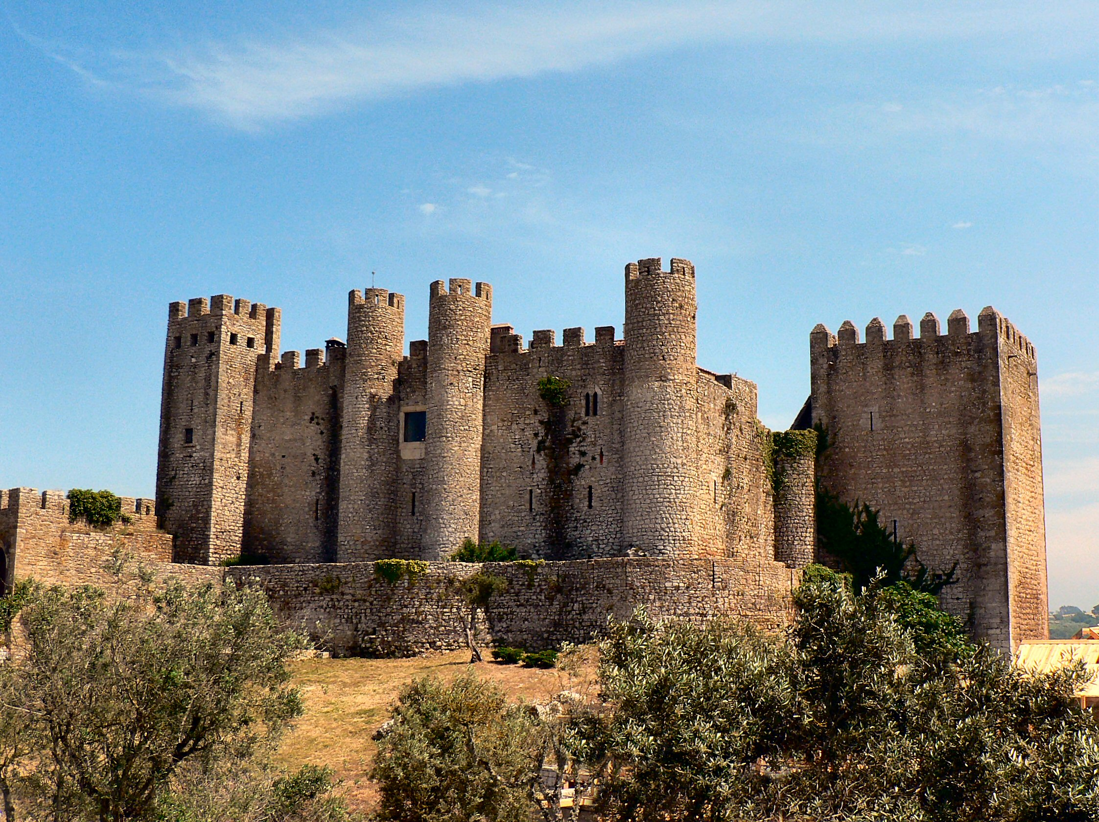 Castelo de Óbidos - actual Pousada do Castelo